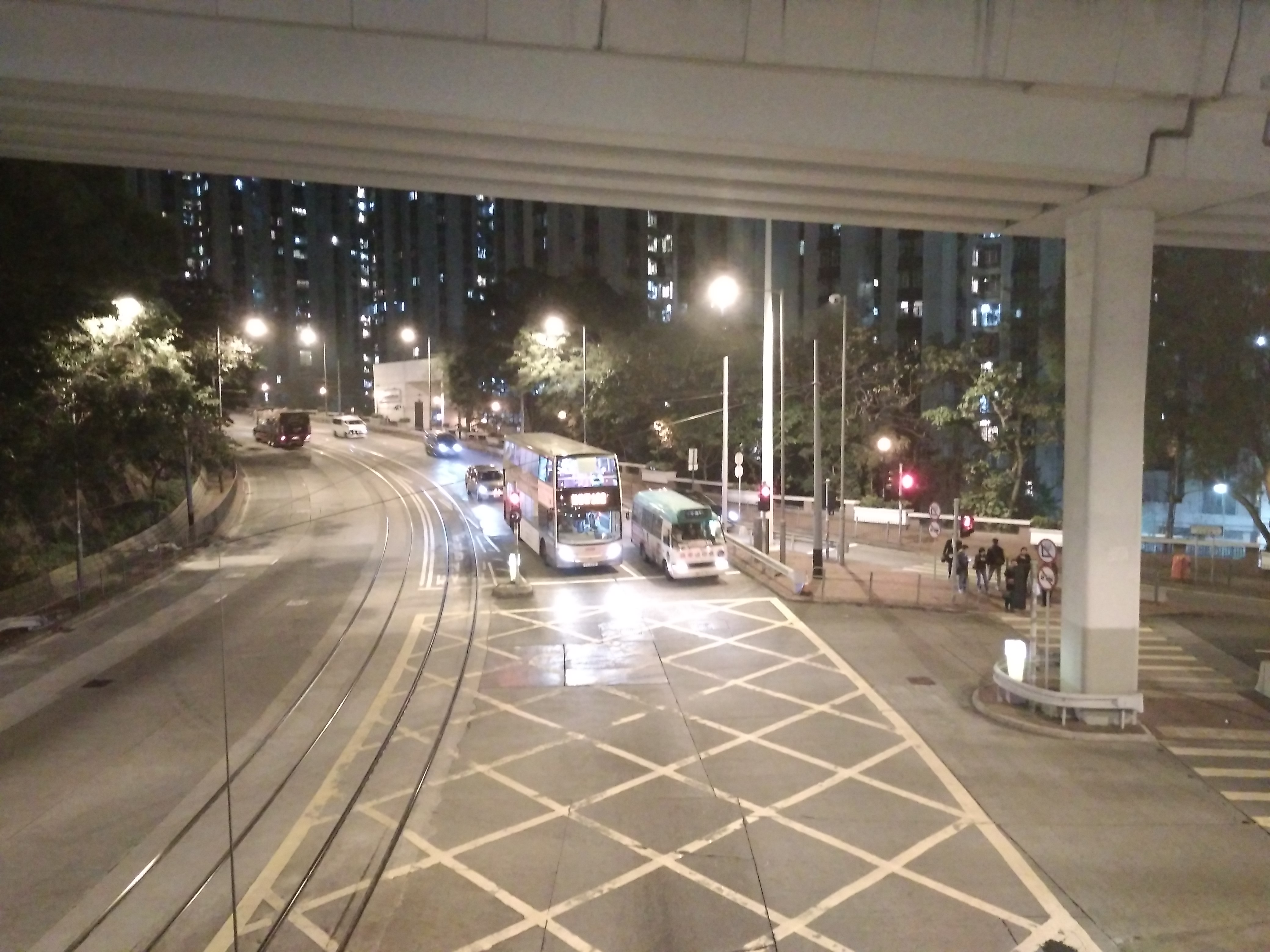 King's Road adjacent to Tai Koo Shing, Hong Kong.